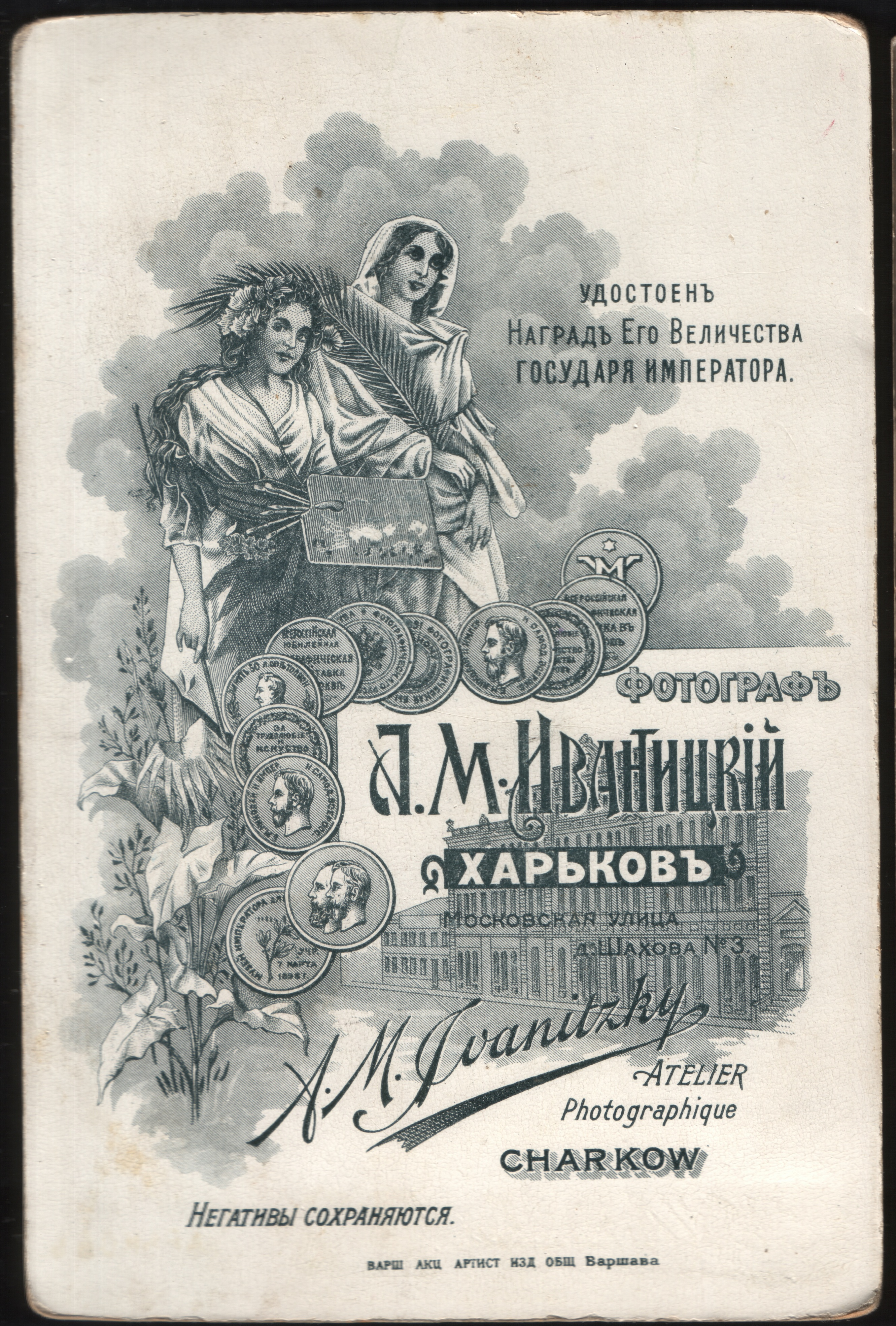 Иваницкий, Алексей Михайлович (1854, Белгород - 1920, Симферополь). Паспарту. Харьков.